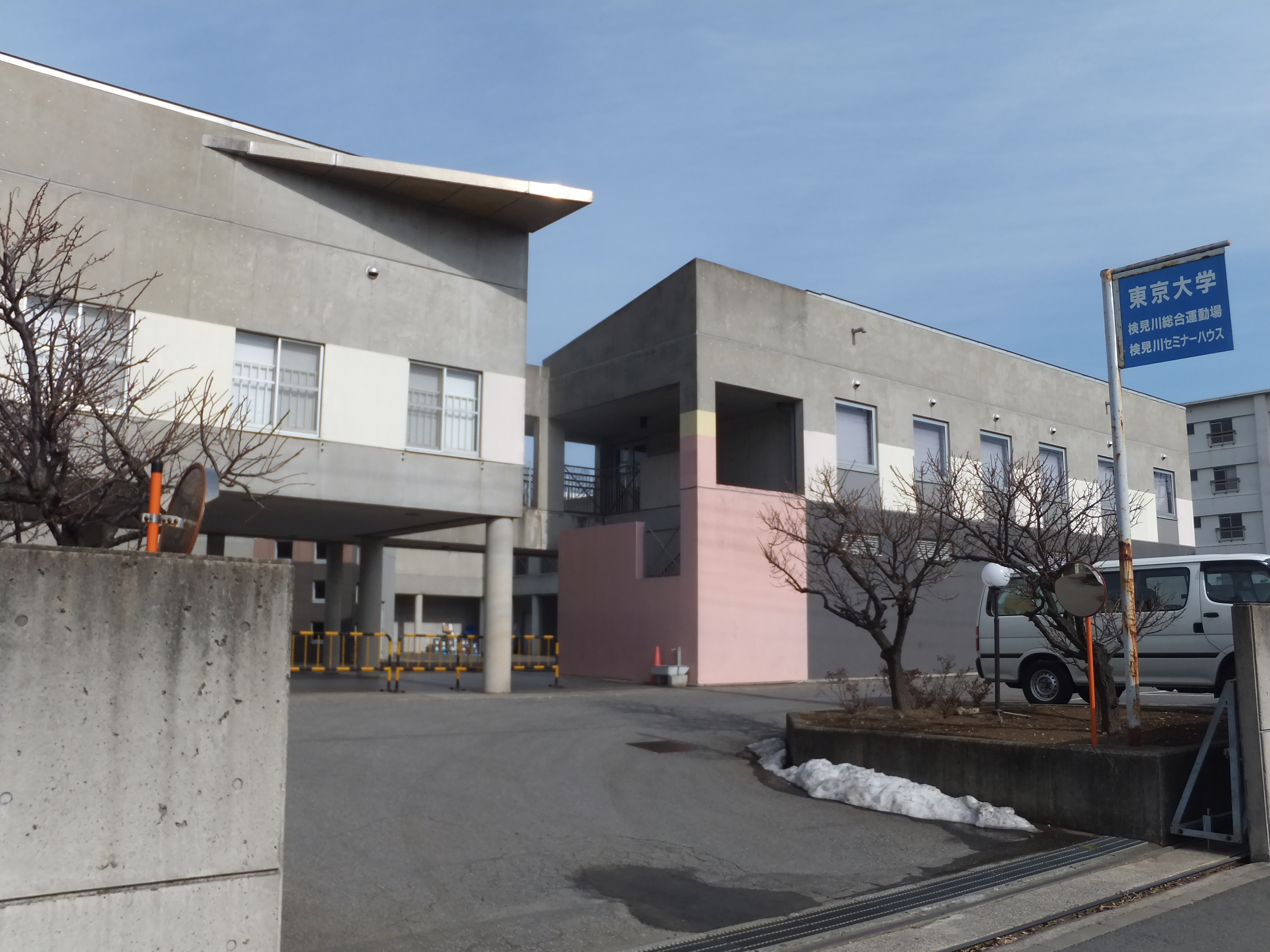 東京大学検見川セミナーハウス（千葉市花見川区）。東京大学検見川総合運動場と一体の施設である。